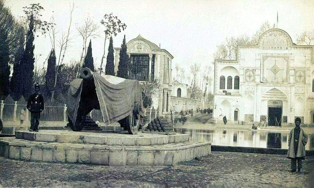 توپ مروارید در میدان ارگ در دورۀ ناصری